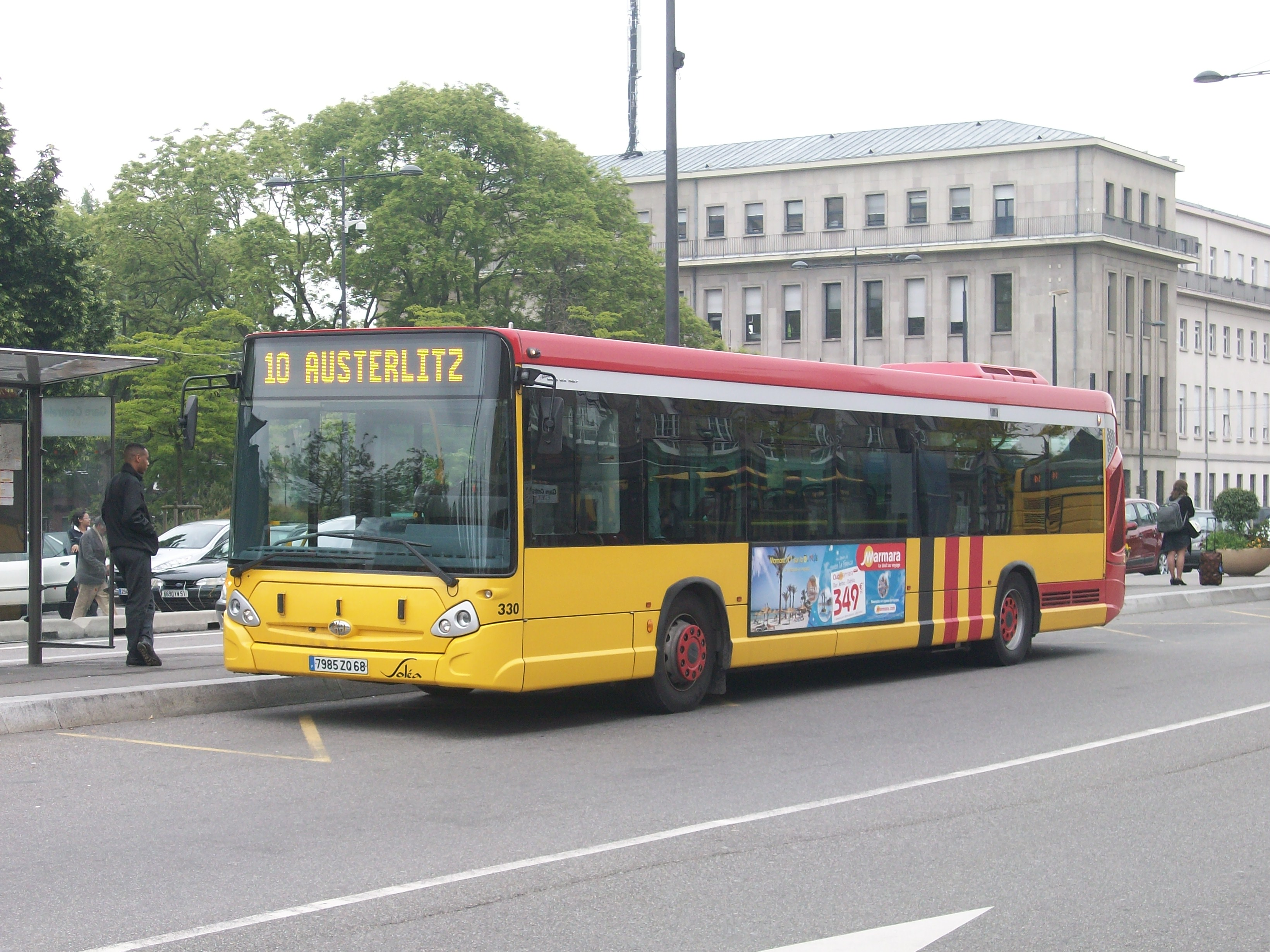 Heuliez GX 327 devant la gare de Mulhouse